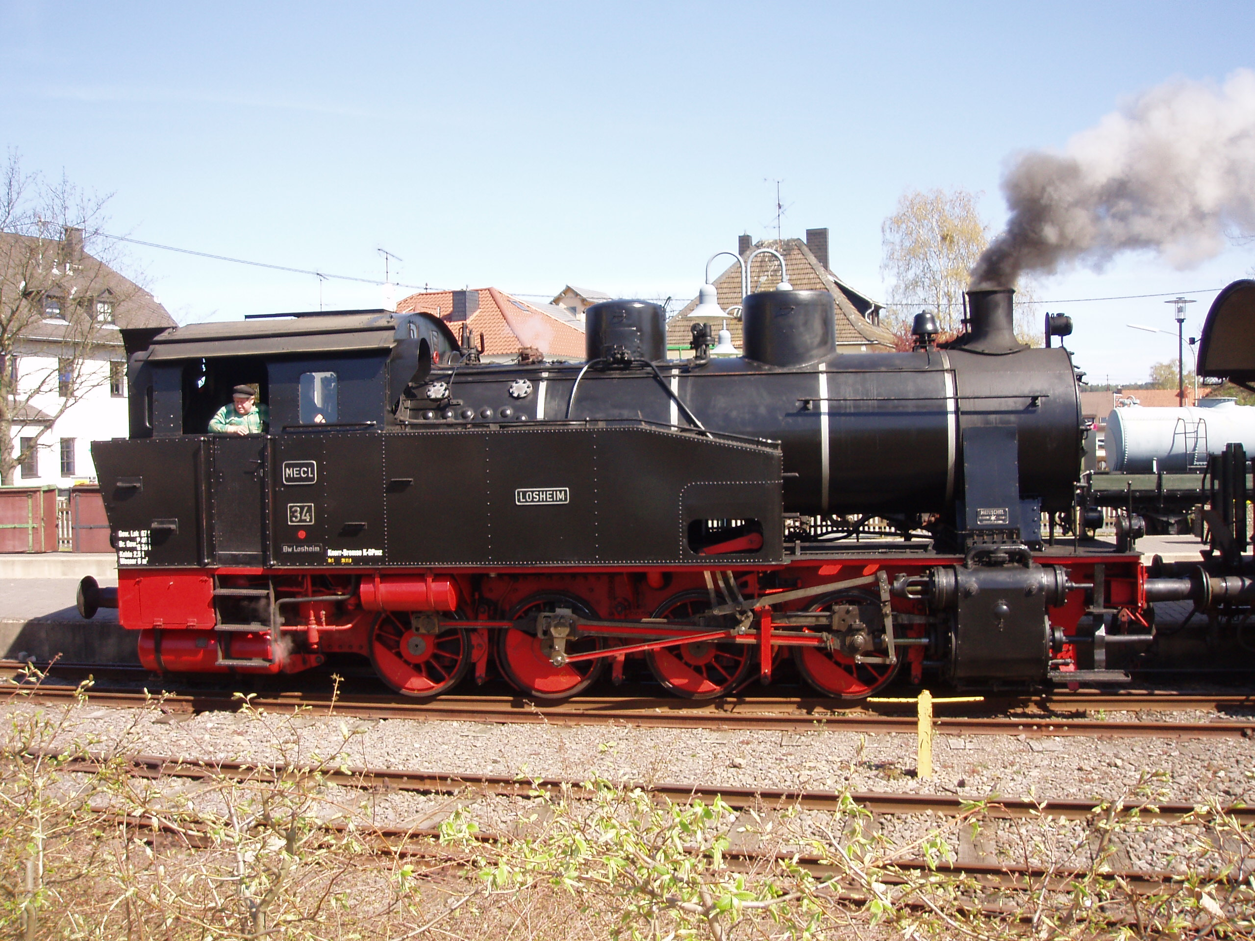 Dampflok "Losheim", gebaut von Henschel, ehemals "Saarberg 34"